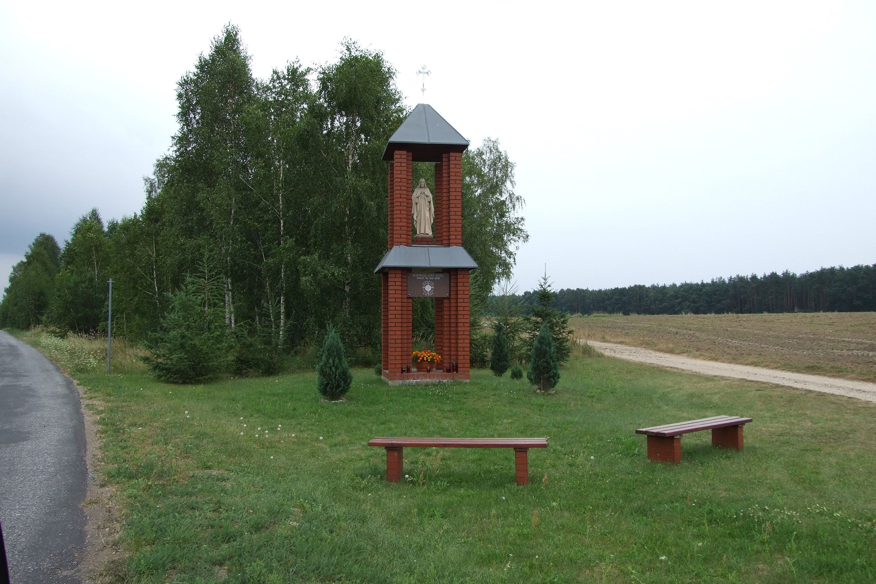 Kaplica jako wotum wdzięczności na Jubileusz Roku 2000 w Boroszowie